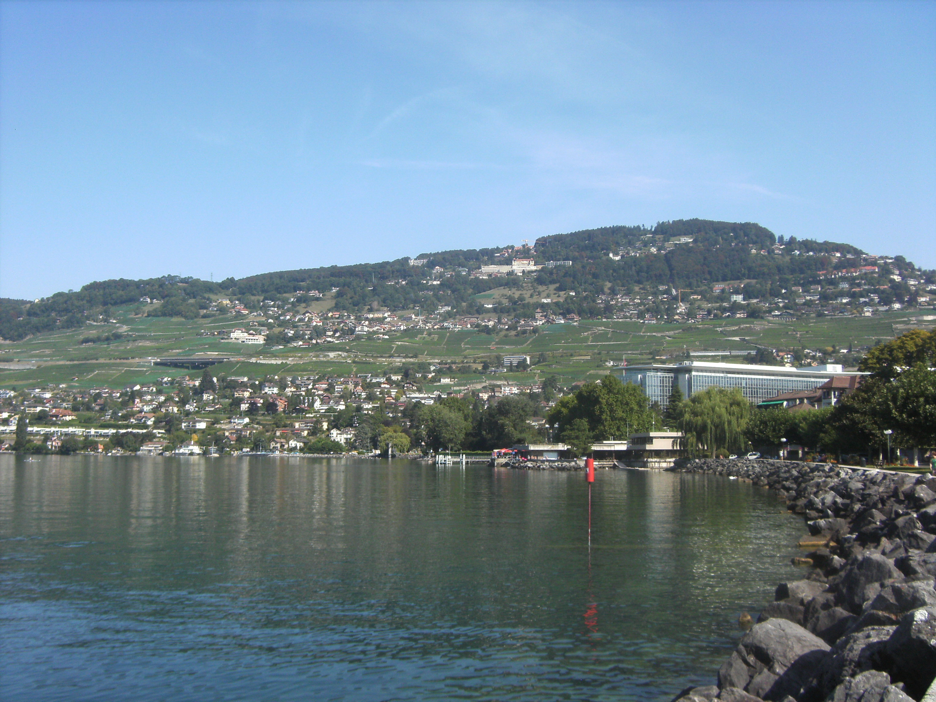 Chardonne (Vaud-Suisse) - Mont Pèlerin vu depuis Vevey.